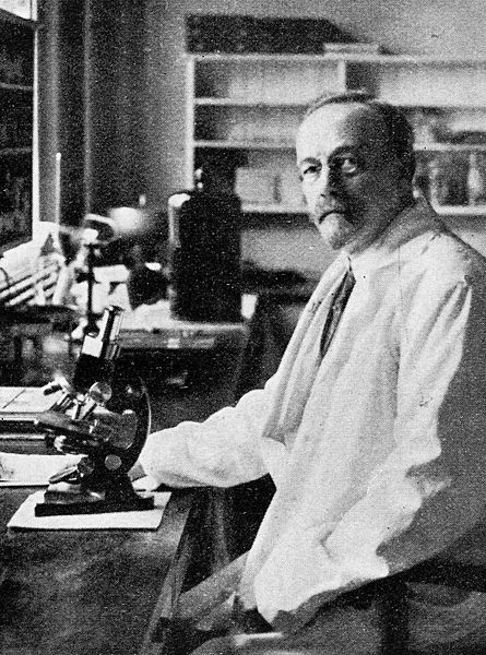 Johannes Fibiger (1867-1928), dansk læge og professor